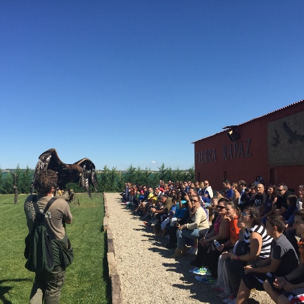 Vuelos diurnas en Tierra rRpaz